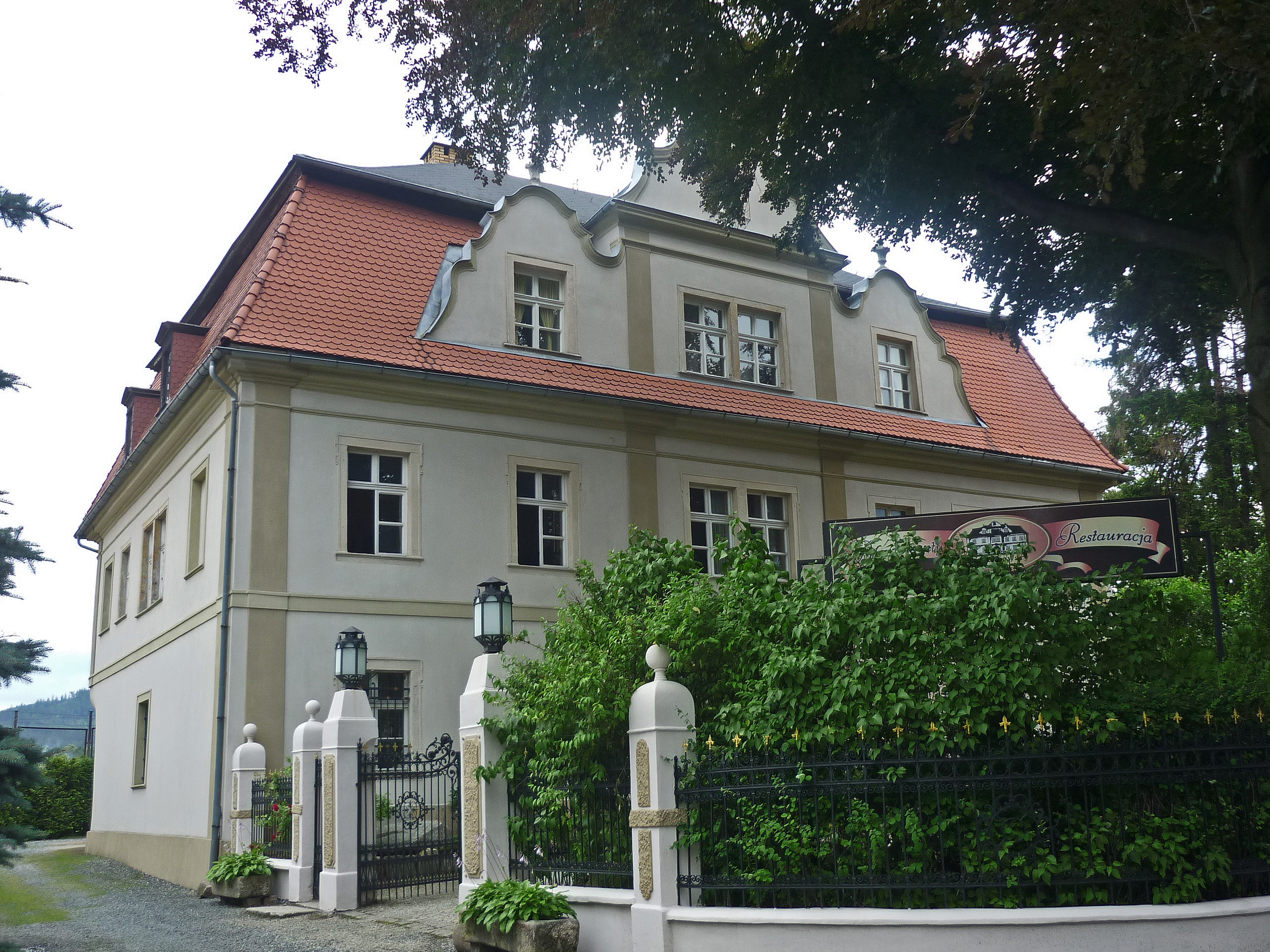 Haus in Schmiedeberg (Kowary) in Niederschlesien